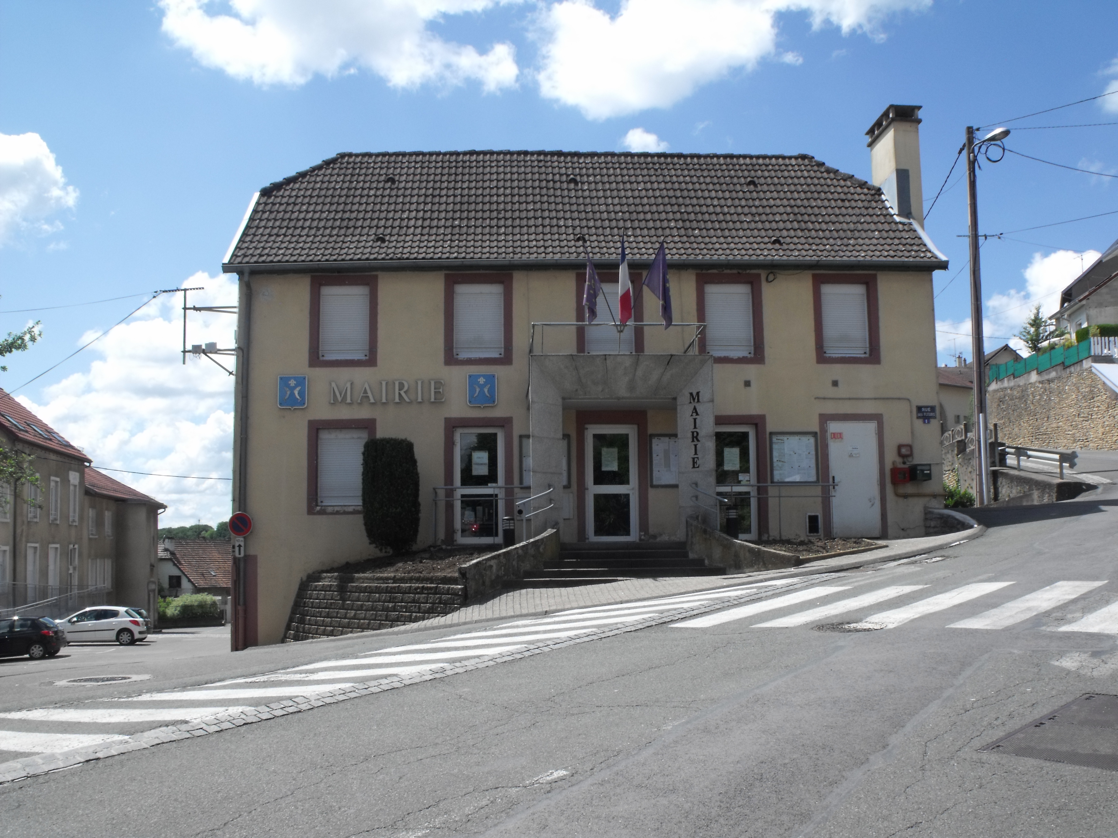 Mairie de Bavans, Département du Doubs, France